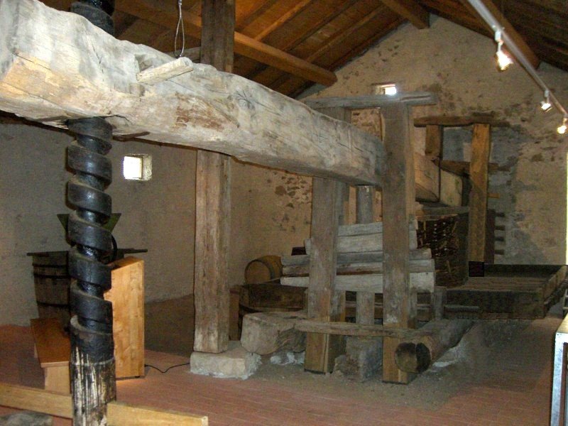 Baierweinmuseum Bach an der Donau - Weinpresse von 1615